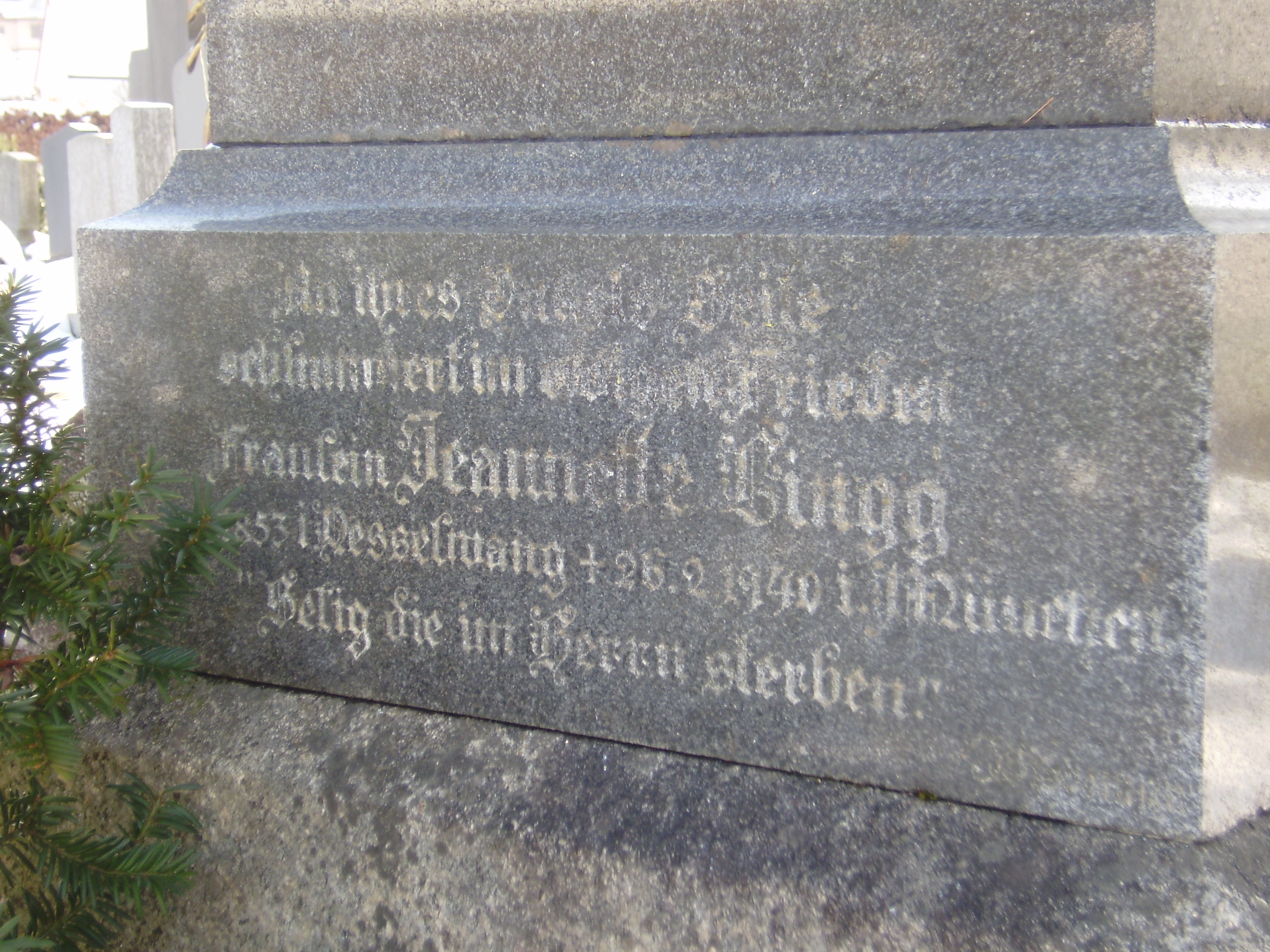 Grabstein von Hieronymus Fäßler (alias Jerome Fassler), Sockelinschrift für seine Nichte Jeannette Lingg auf dem Friedhof hinter der Pfarrkirche von Weiler im Allgäu (Bayern, Deutschland)